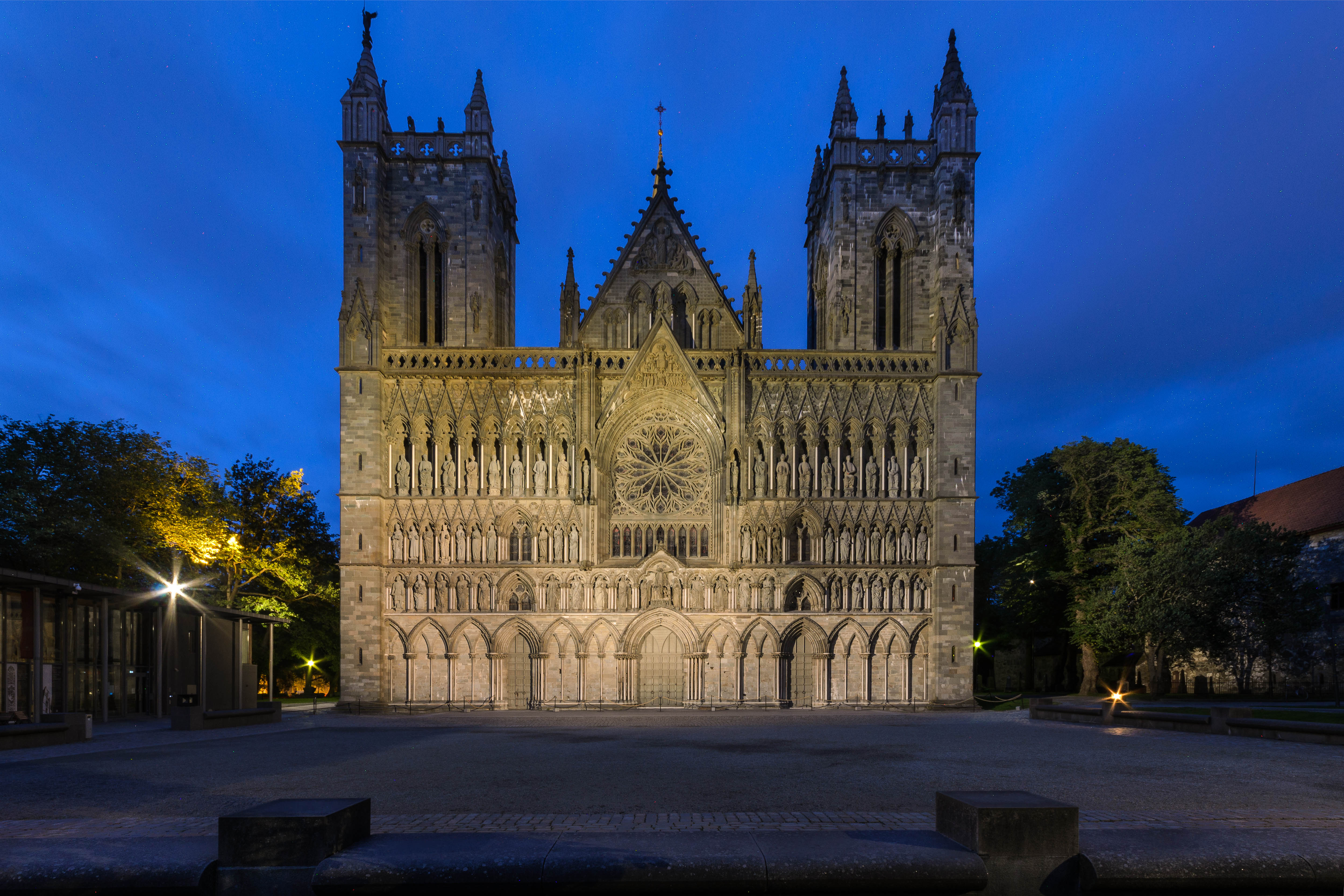 Nidaros Cathedral fotografert i "den blå timen"